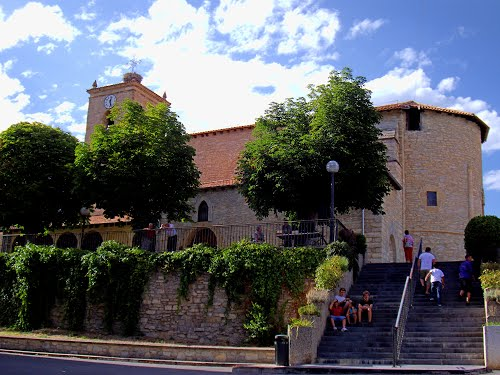 Iglesia de la Asunción de Nuestra Señora, en Nanclares de la Oca (Álava, España)